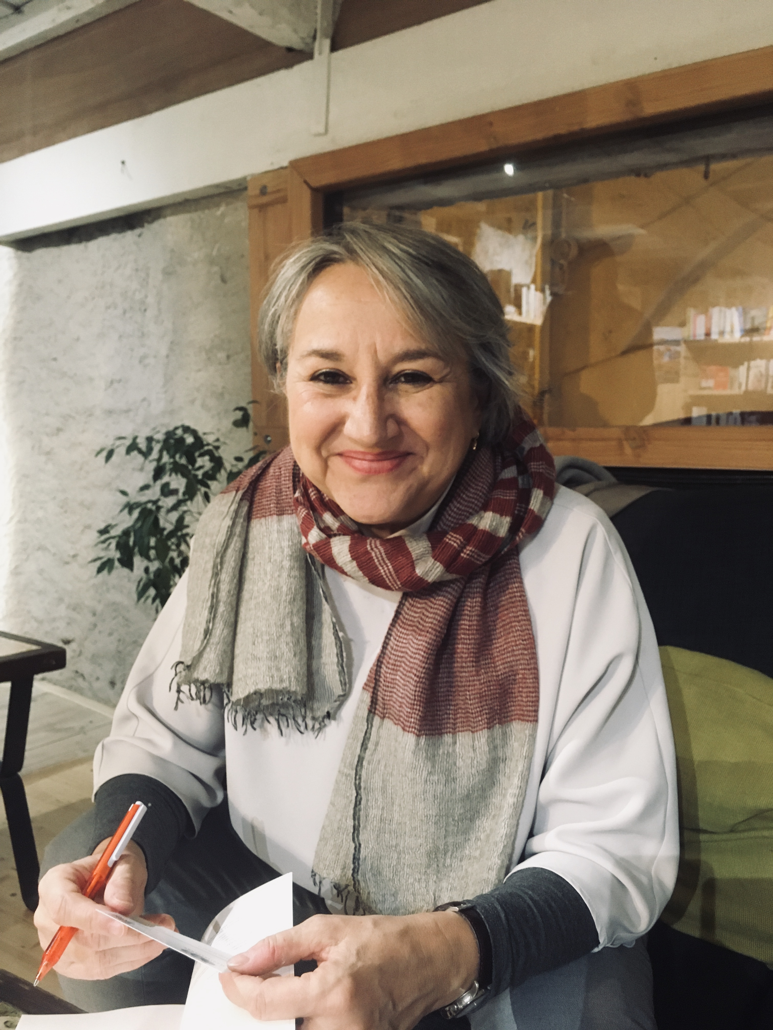 Photographie réalisée avec le consentement du sujet, suite à la conférence donnée à la librairie Fièrs de Lettres à Montpellier le 12 novembre 2019